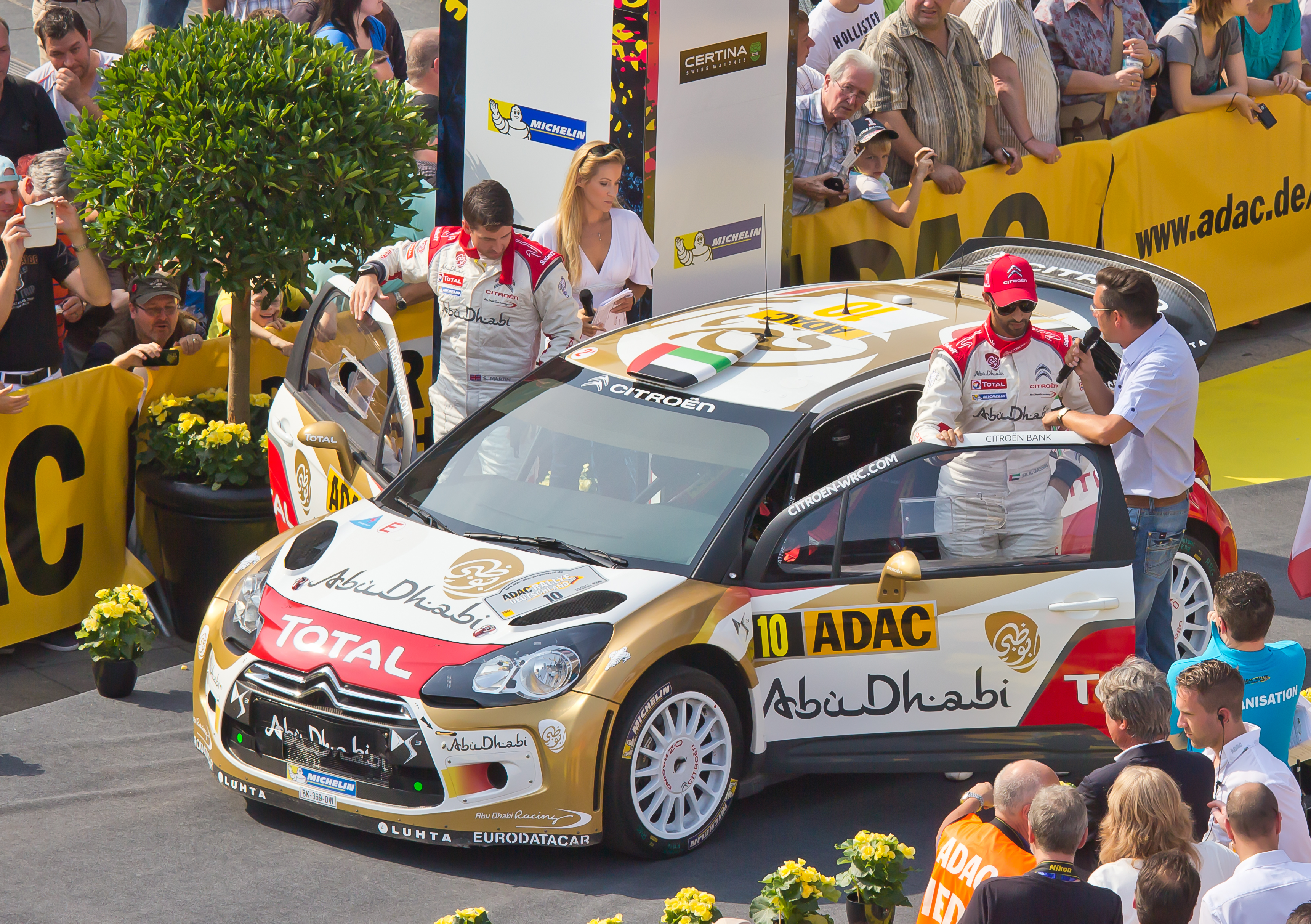 ADAC Rallye Deutschland 2013 - Fahrerpräsentation auf dem Roncalliplatz. Khalid Al Qassimi und Scott Martin vom Abu Dhabi Citroen Total World Rally Team im Citroen DS3 WRC, Startnummer 10